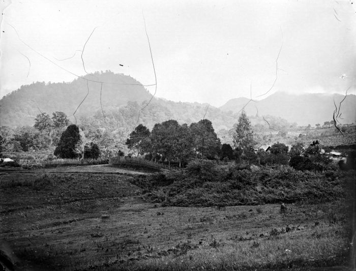 Negatief. Koffieplantage, Junggo, Oost-Java